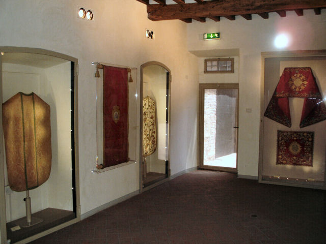 Certaldo, Museo Arte Sacra, Sala V